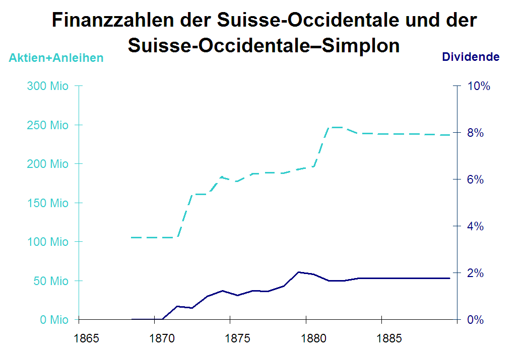 Aktienkapital und feste Anleihen sowie Dividende Aktien sind Anteile am Grundkapital des als Aktiengesellschaft konstituierten Bahnunternehmens. Sie sind hier im Nennwert angegeben, der jedoch in keiner Weise dem Kurswert entsprechen muss. Viele Bahnen haben im Laufe der Zeit ihr Aktienkapital erhöht, was gewöhnlich auf eine Expansion der Bahn hindeutet. Eine Verminderung des Aktienkapitals wurde bei finanziellen Schwierigkeiten vorgenommen, indem durch Herabsetzung des Nennwerts der Aktien Kapital für das Unternehmen freigesetzt wurde (sogenannter Kapitalschnitt). Feste Anleihen waren neben Aktien die wichtigste Form der Geldbeschaffung für die Bahnen. Das vom Unternehmen aufgenommene Kapital wird über eine bestimmte Laufzeit zu einem bestimmten Zinssatz verzinst. Die Zinslast für Anleihen war ein gewichtiger Ausgabeposten insbesondere der grossen Bahnen. Wenn wegen zu geringen Erträgen die Zinsen nicht mehr bezahlt werden können, droht der Konkurs. Die Dividendenauszahlungen für die Aktionäre sind hier im Verhältnis zum Nennwert der Aktien angegeben.